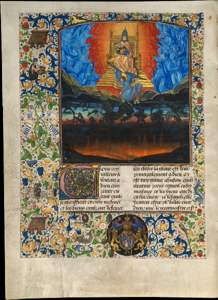 Miniature d'un manuscrit du Livre de bonnes mœurs de Jacques Legrand